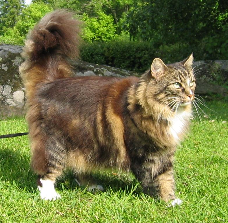 Norsk Skogkatt, Evita 5 år